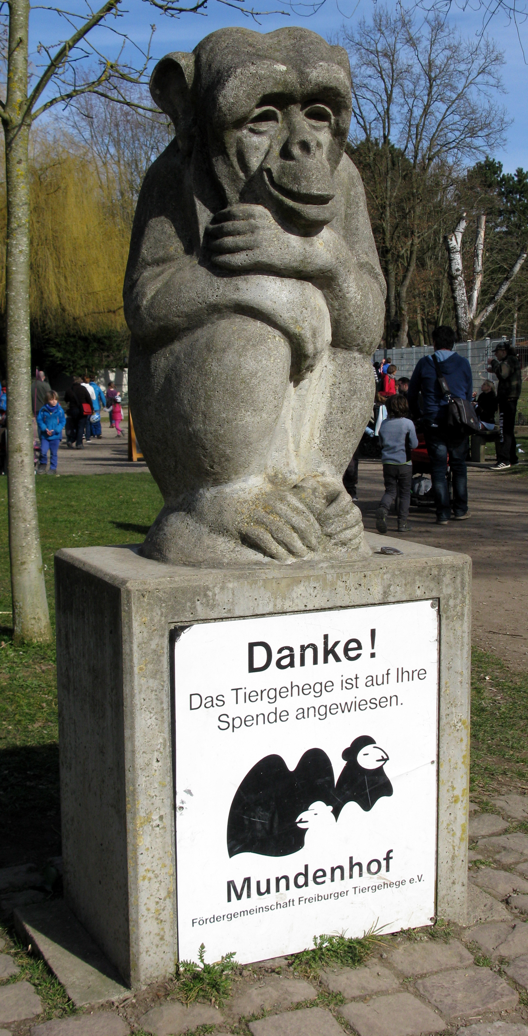 Skulptur von Ulrich Kottenrodt von 1972 auf dem Mundenhof in Freiburg